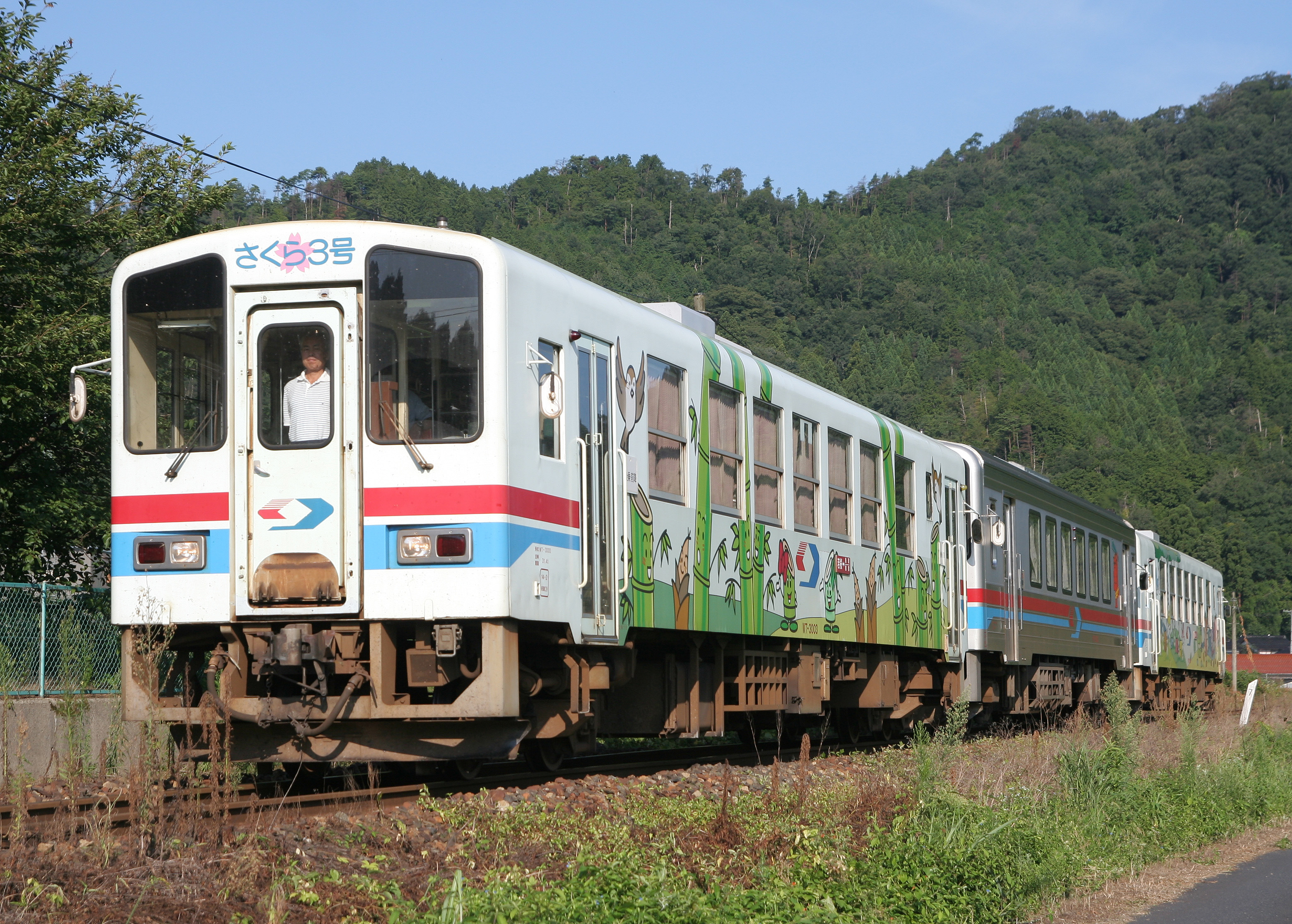 若桜鉄道WT3000形気動車3003・3001とWT3300形気動車3301の3両編成。若桜線 隼-安部